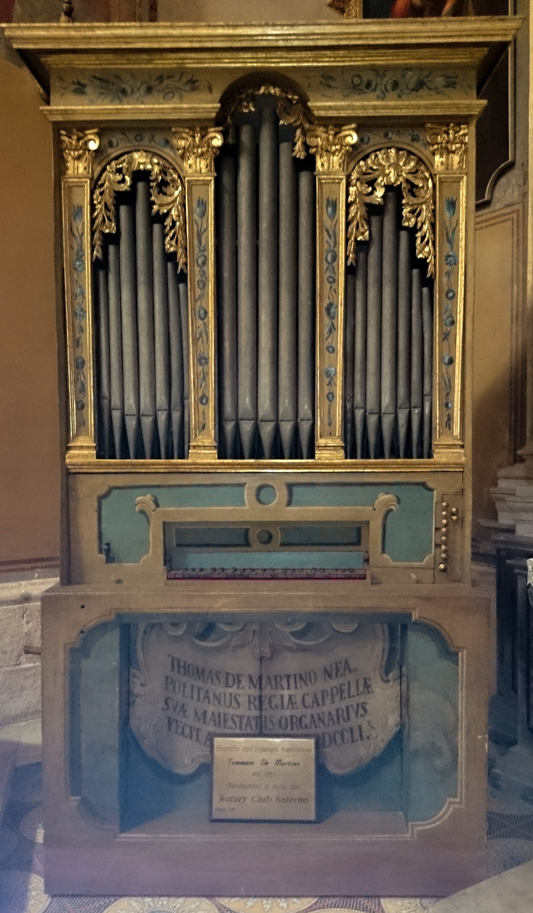 Organo di San Giorgio